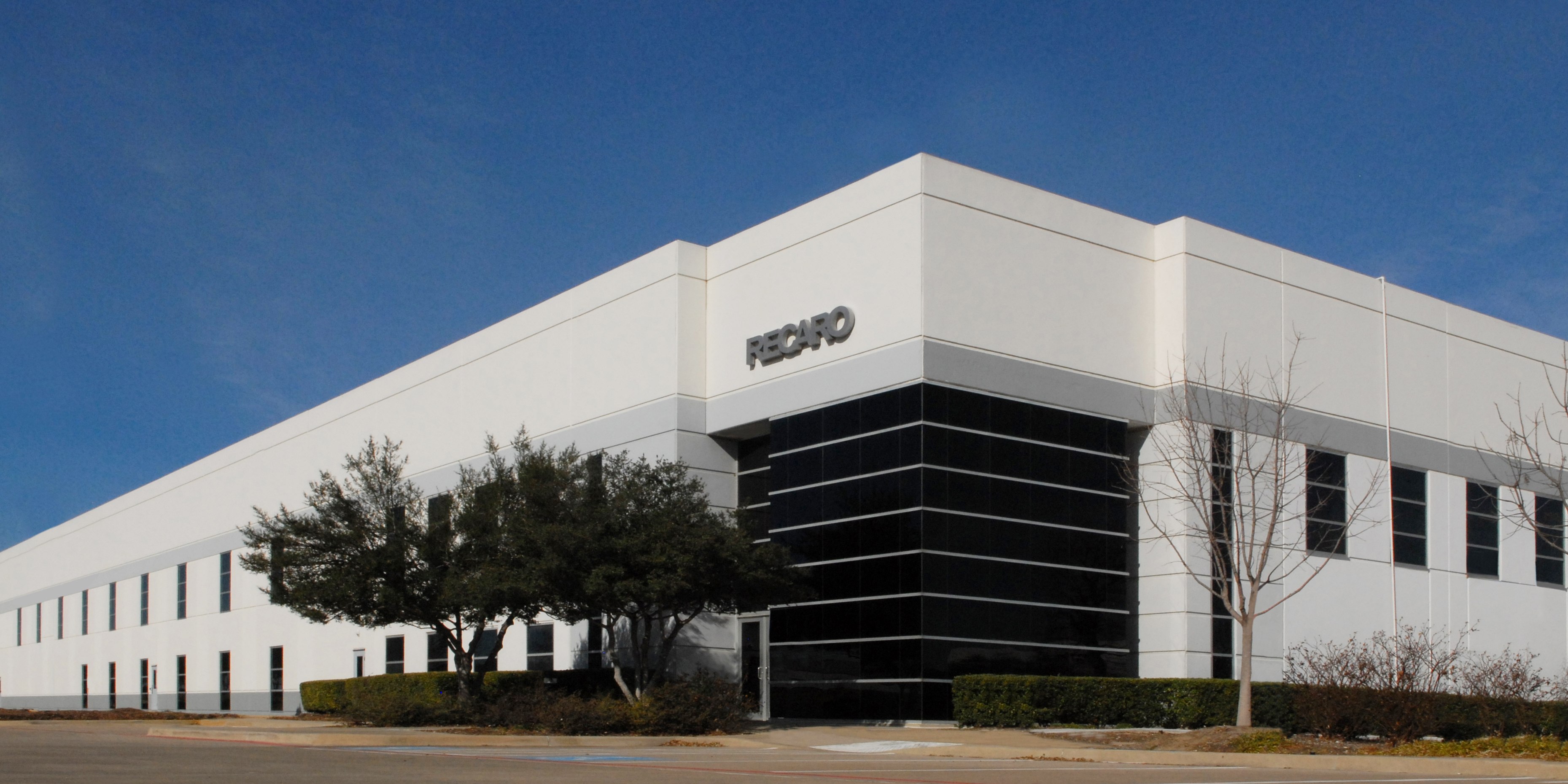 RECARO Aircraft Seating, Firmengebäude Schwäbisch Hall